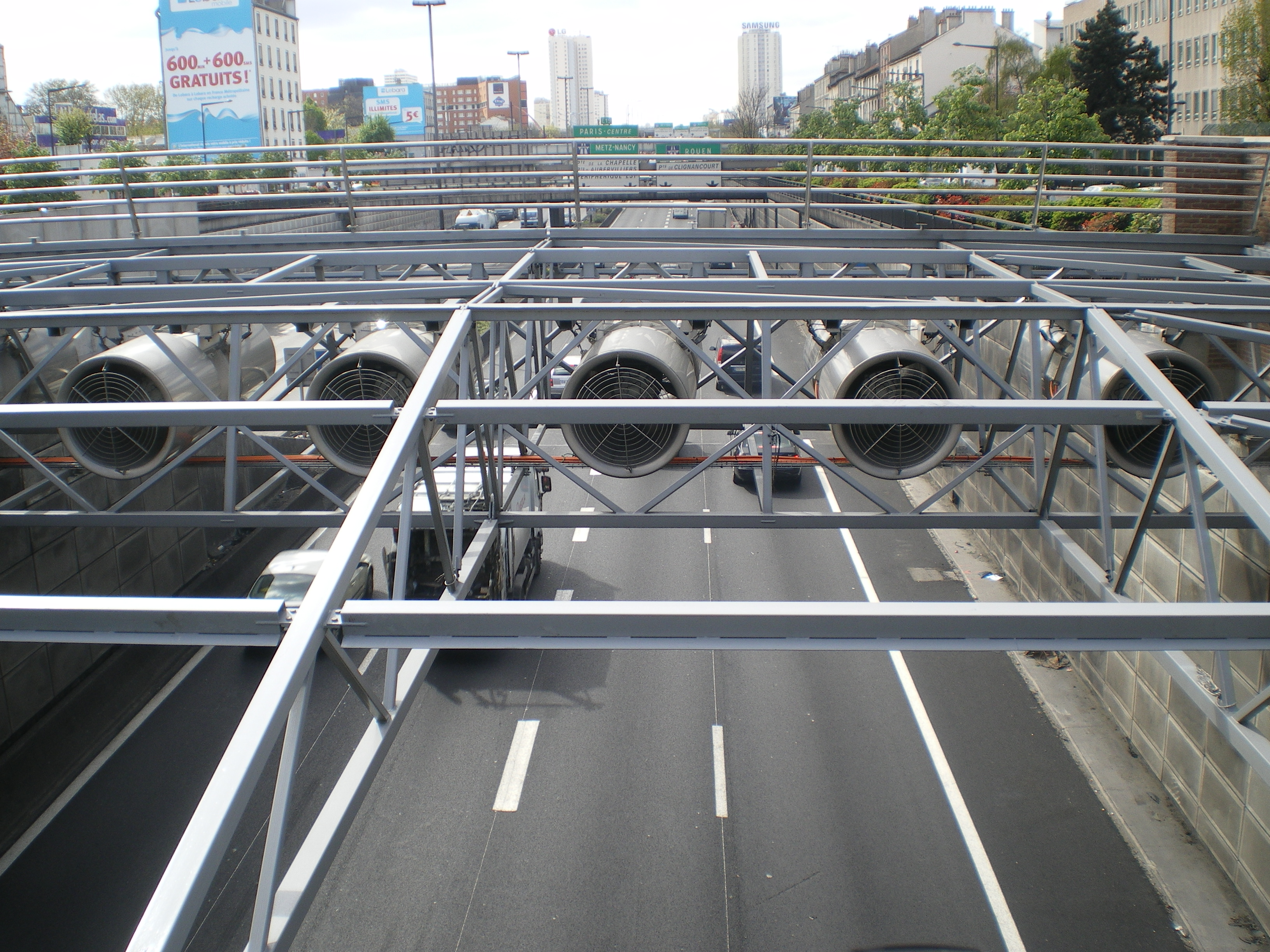 Ventilateurs posés pendant les travaux de mise aux normes du Tunnel du Landy situés au dessus du portail du tunnel